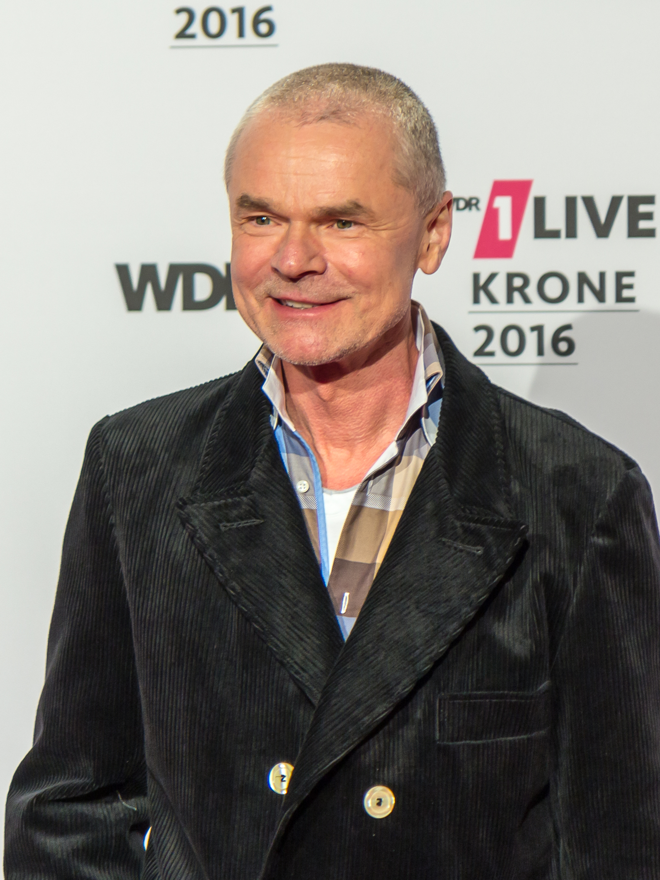 1LIVE Krone 2016 - 1700 - Roter Teppich - Domian